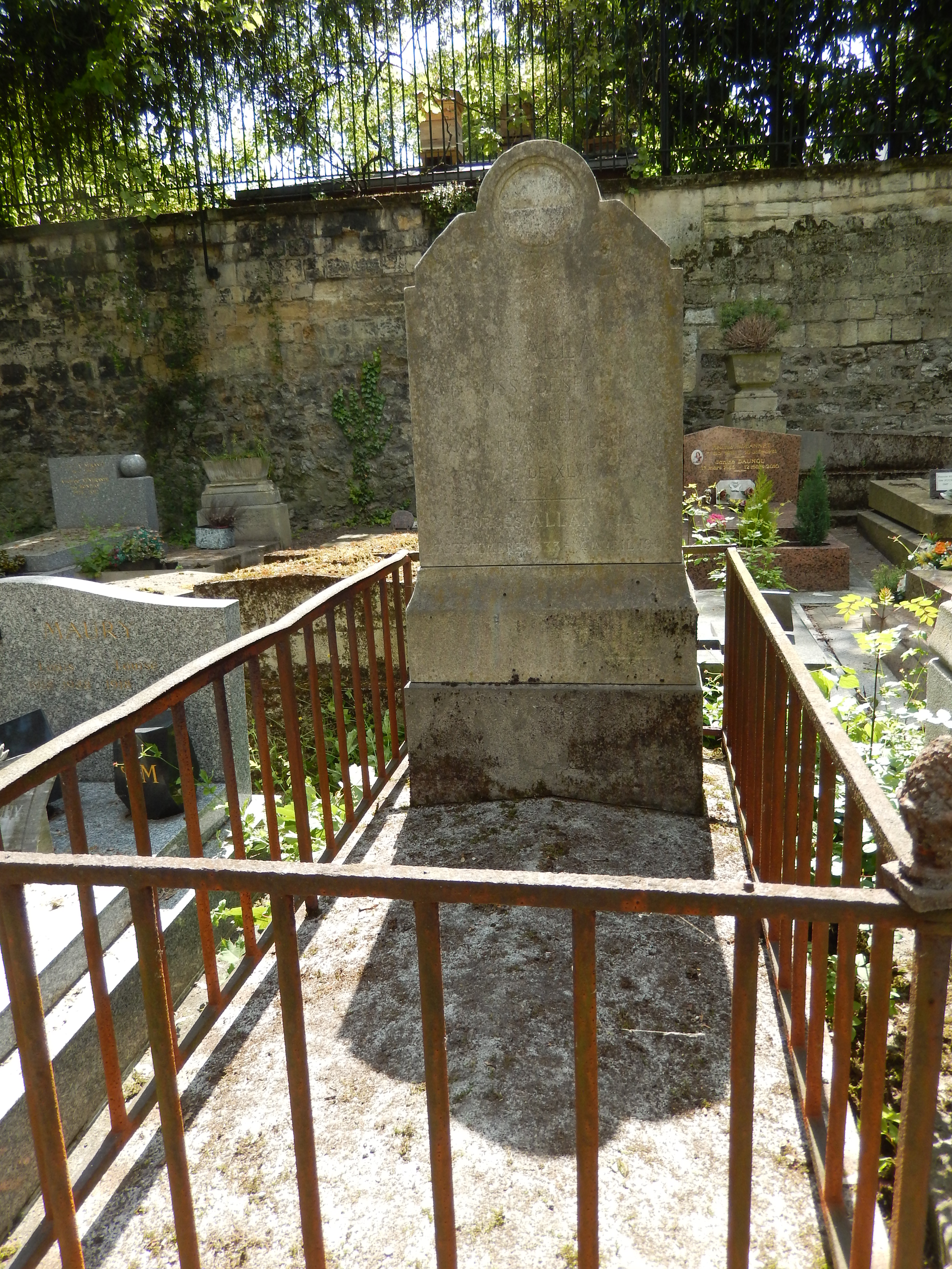 Tombe de Louise Rosalie Allan-Despreaux (cimetière du père Lachaise, div 73)